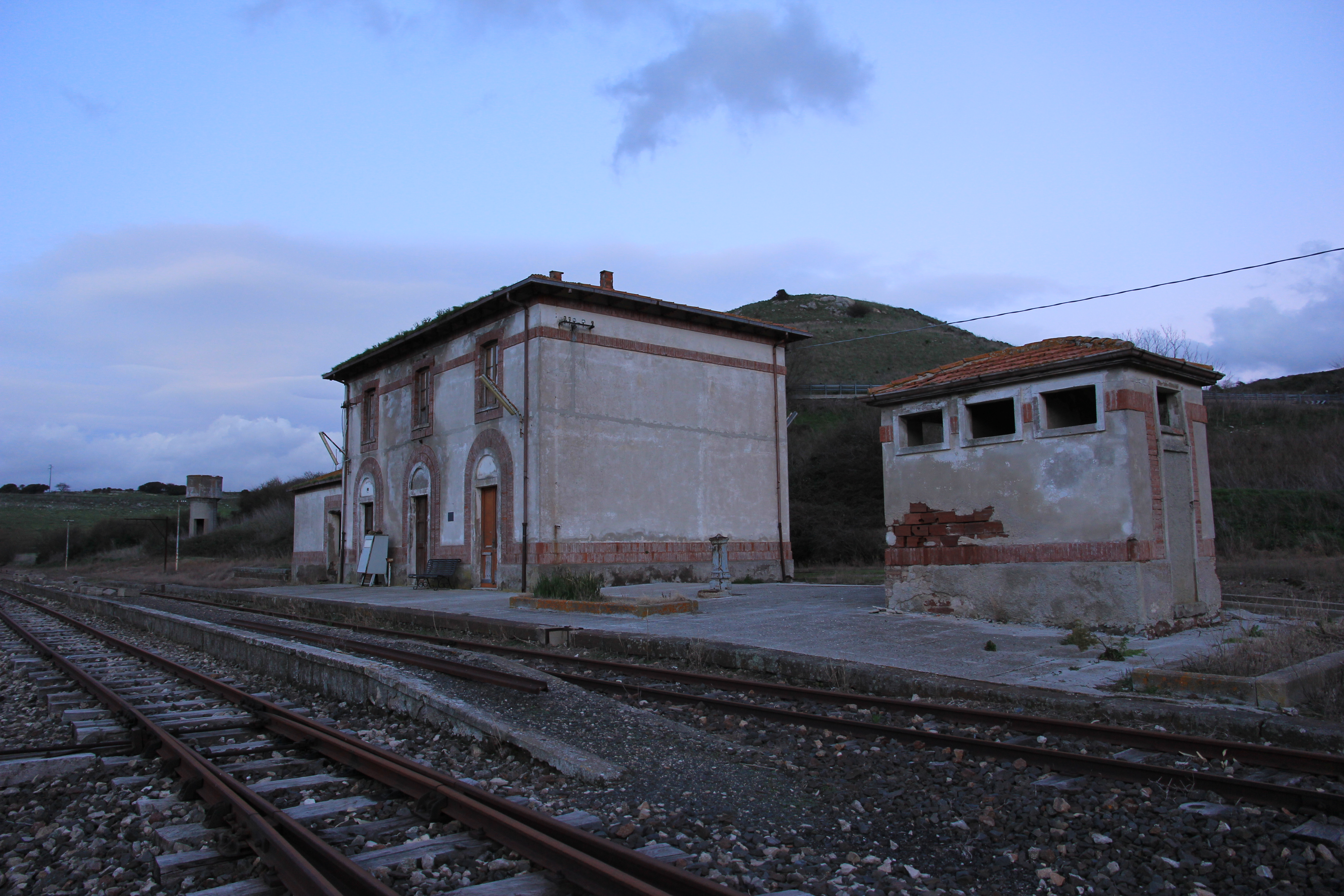 Martis - Stazione ferroviaria